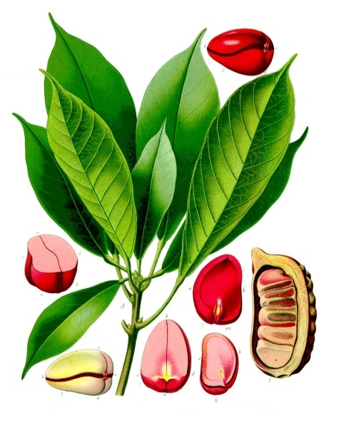 Kolanuss. A Blattzweig 2/3 natürlicher Grösse. 1 Fruchtlängsschnitt 2/3; 2 roter Samen ohne Schale 1/1; 3 weisser Samen ohne Schale 1/1; 4 Querschnitt 1/1; 5 Längsschnitt desselben in der Richtung a b; em Embryo 1/1; 6 derselbe von einem weissen Samen; 7 Längsschnitt in der Richtung c d, die Insertion der Keimblätter am Embryo zeigend.